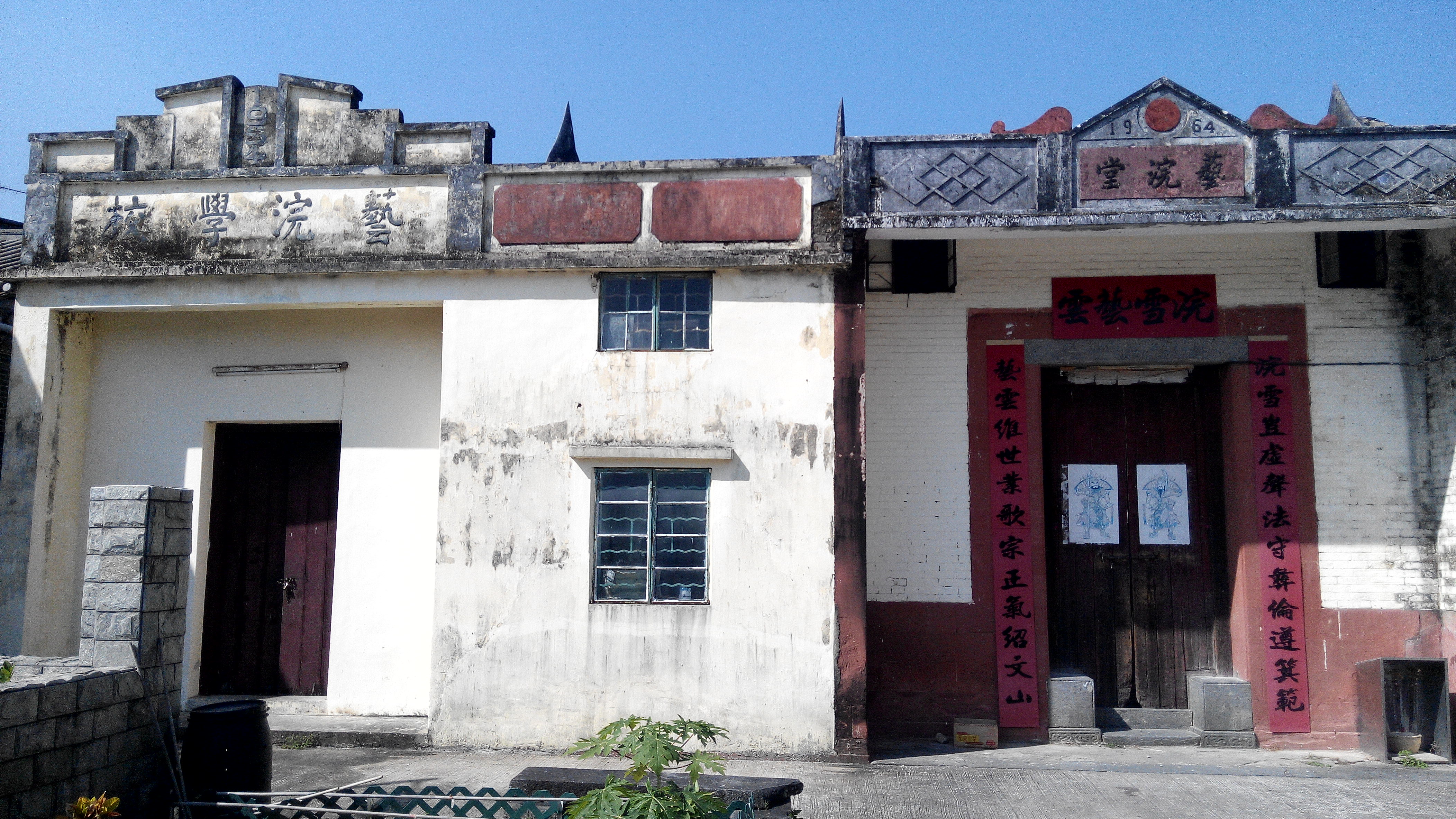 大埔泰亨鄉藝浣堂及藝浣學校